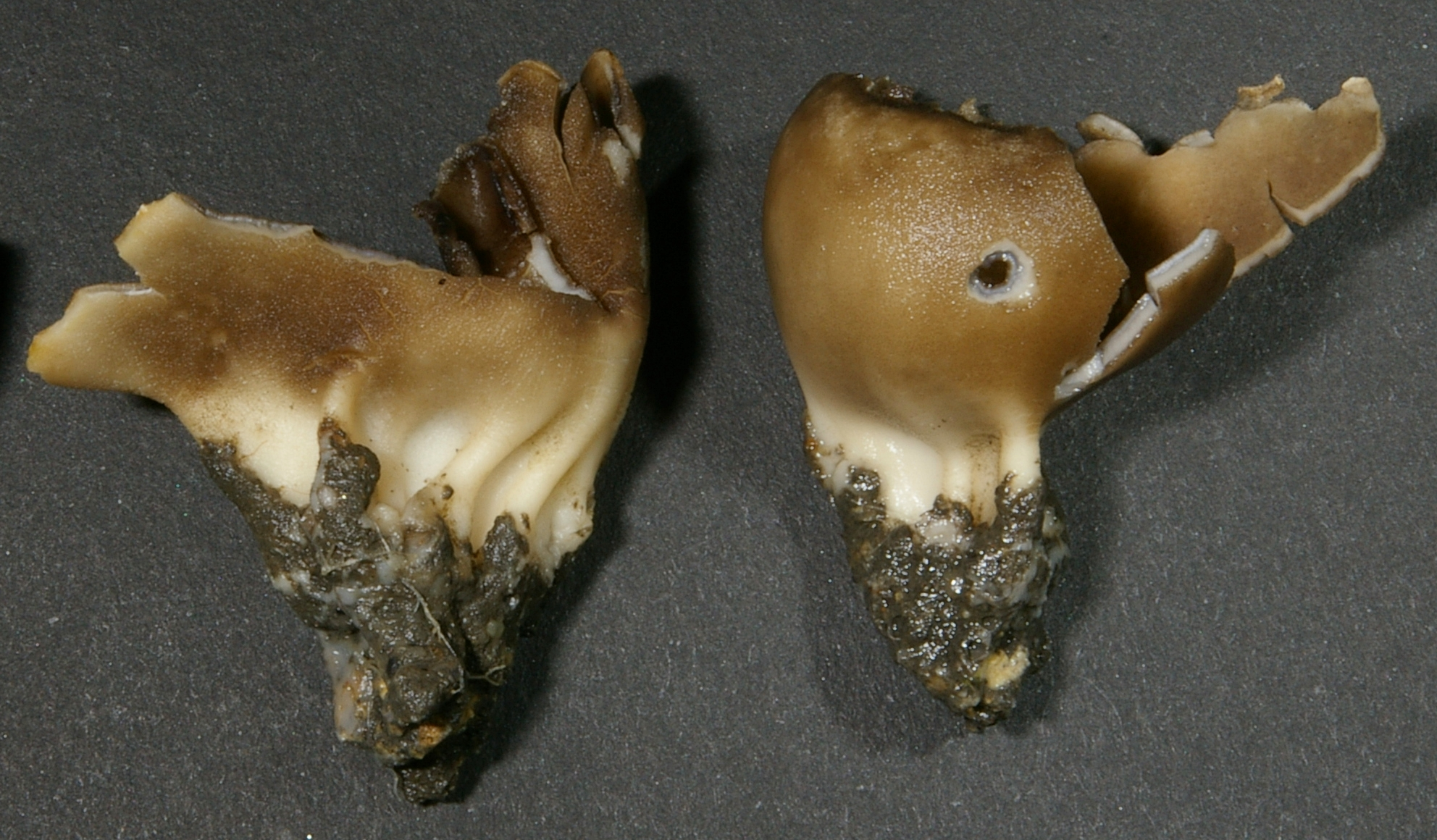 Helvella leucomelaena, piestrzyca (jeszcze bez polskiej nazwy). Sfotografowano w Rybniku.